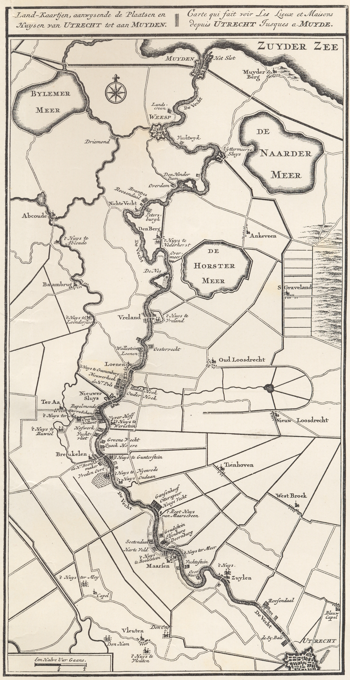 Kaart van de Vechtstreek en omgeving uit 1719 door Daniël Stoopendaal in De Zegepralende Vecht. In de kaart staan onder meer verschillende plaatsen, wateren en buitenplaatsen aangegeven.